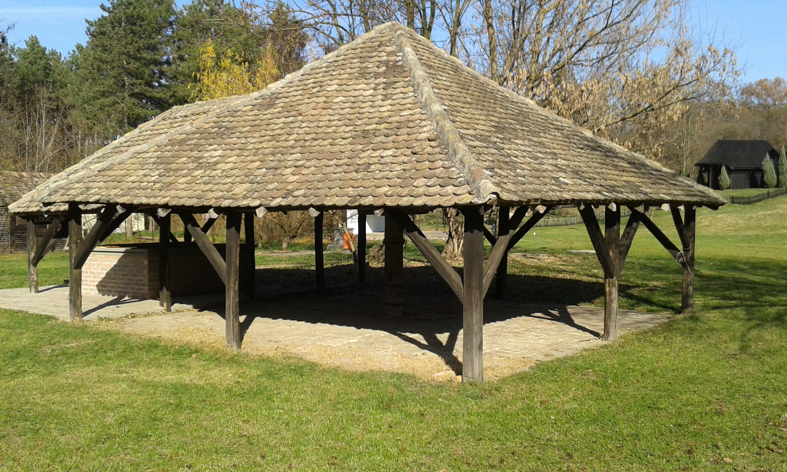 Devojački Bunar